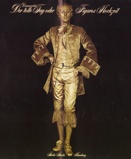 Peter Müller-Buchow a German Dramatist in the 1970s / See article